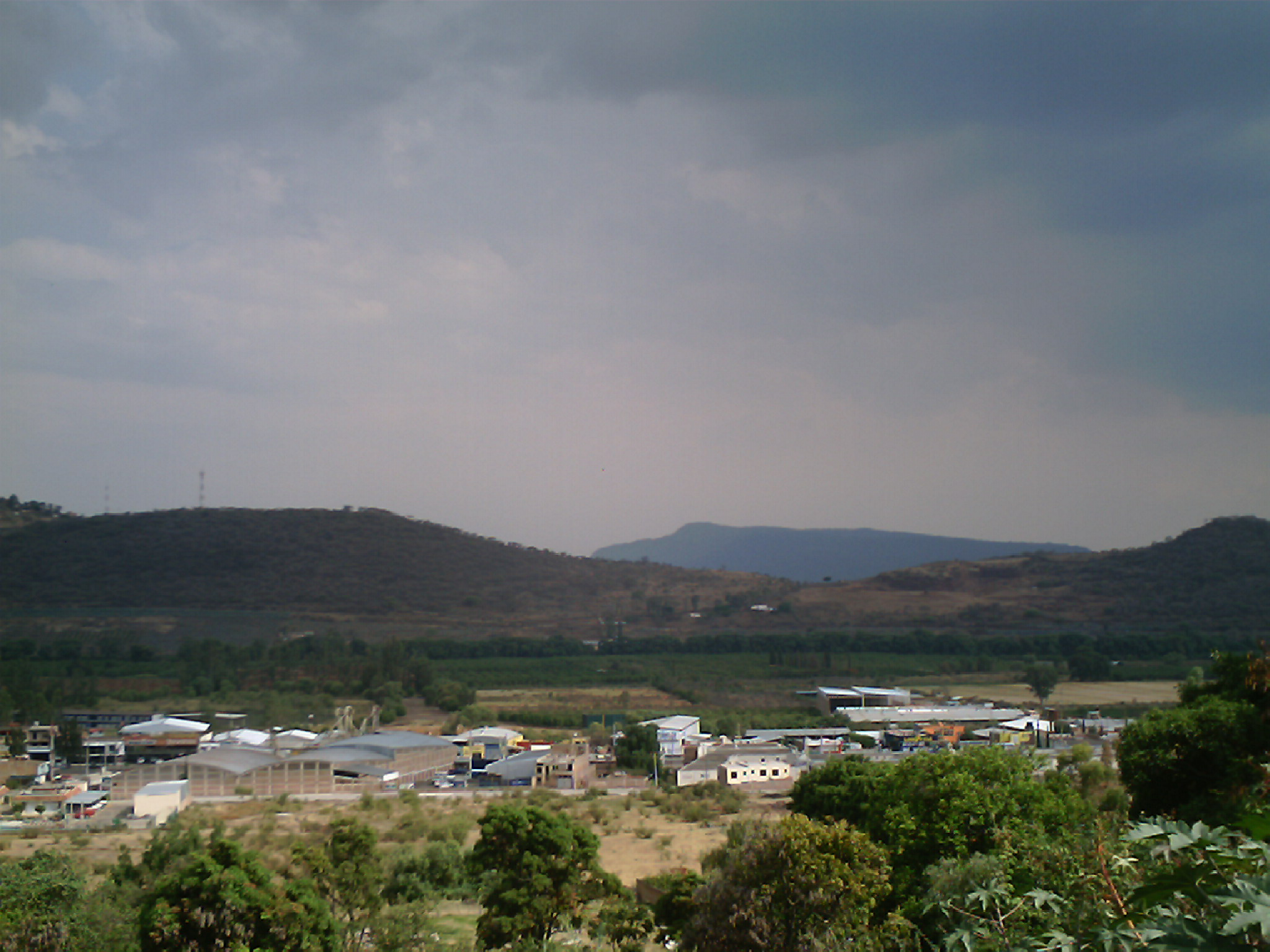 Vista desde el cerro de la entrada del lado Oeste de Atotonilco el Alto.